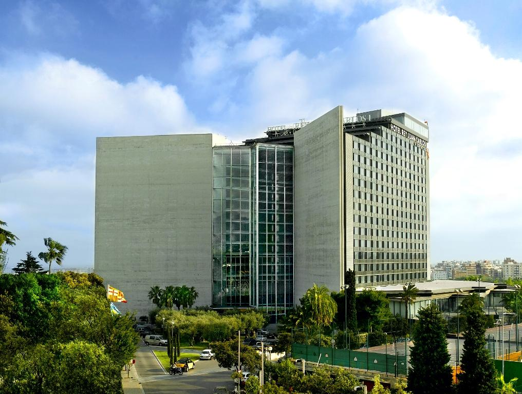 El Hotel Rey Juan Carlos I fue inaugurado por Sus Majestades Los Reyes de España pocos días antes de la apertura de los Juegos Olímpicos de 1992 en Barcelona, y tan solo 649 días después de que comenzaran las obras.